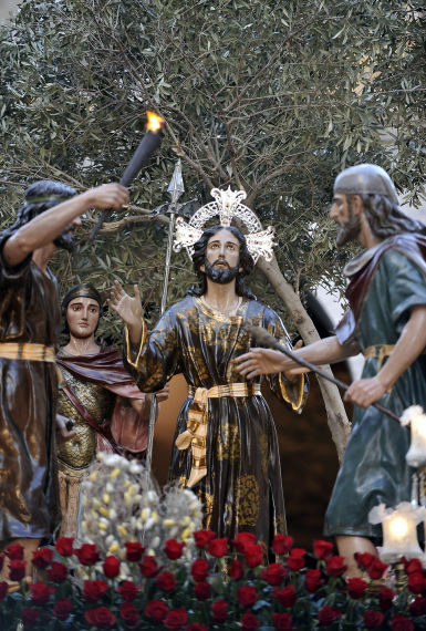 Detalle del paso del Prendimiento, de la Cofradía del Perdón de Murcia (España), obra de José Sánchez Lozano